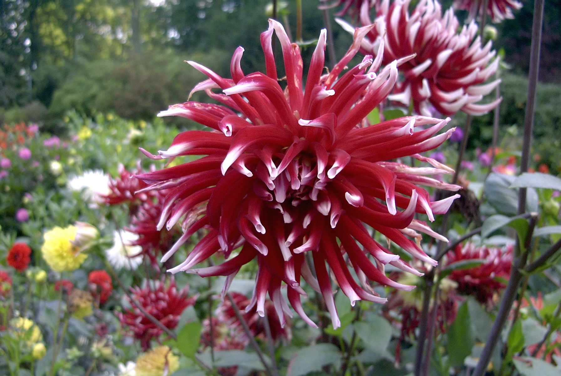 Dahlie